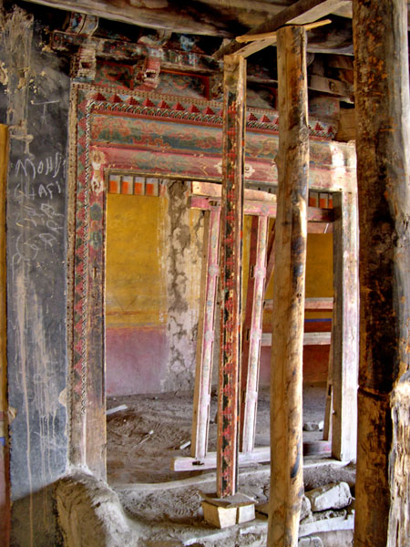 El palau de Leh. Sala noble interior (Ladakh, Índia)